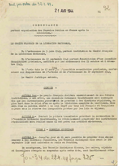 Ordonnance portant organisation des pouvoirs publics en France après la libération, première page.